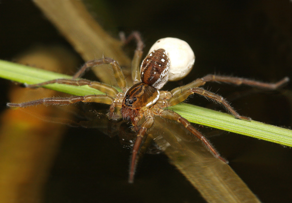 Spider - Pirata piraticus